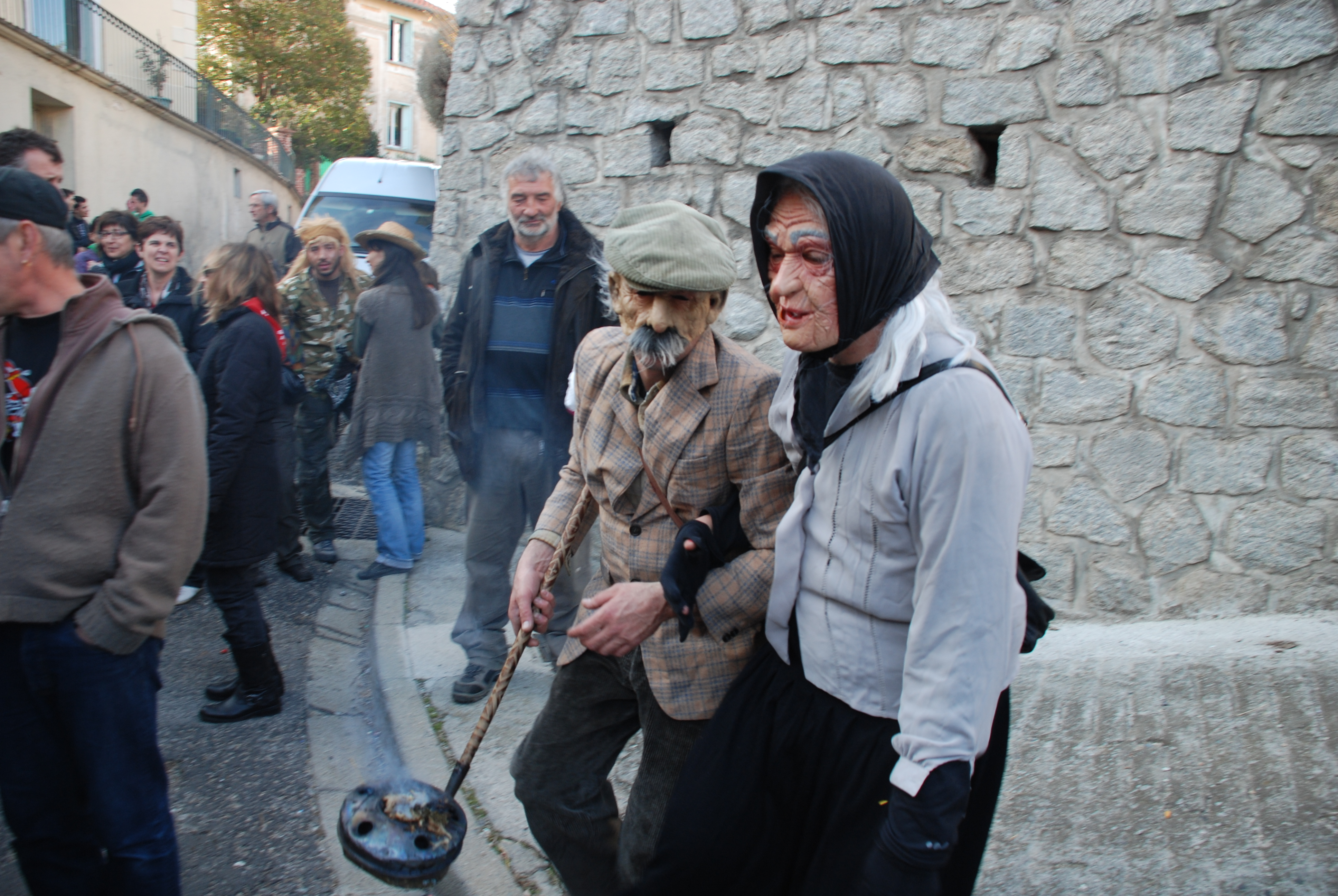 Le Vell et la Vella, deux personages de la Fête de l'Ours de Saint-Laurent-de-Cerdans